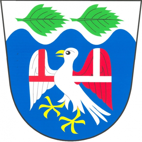 znak, Březnice, okres Tábor